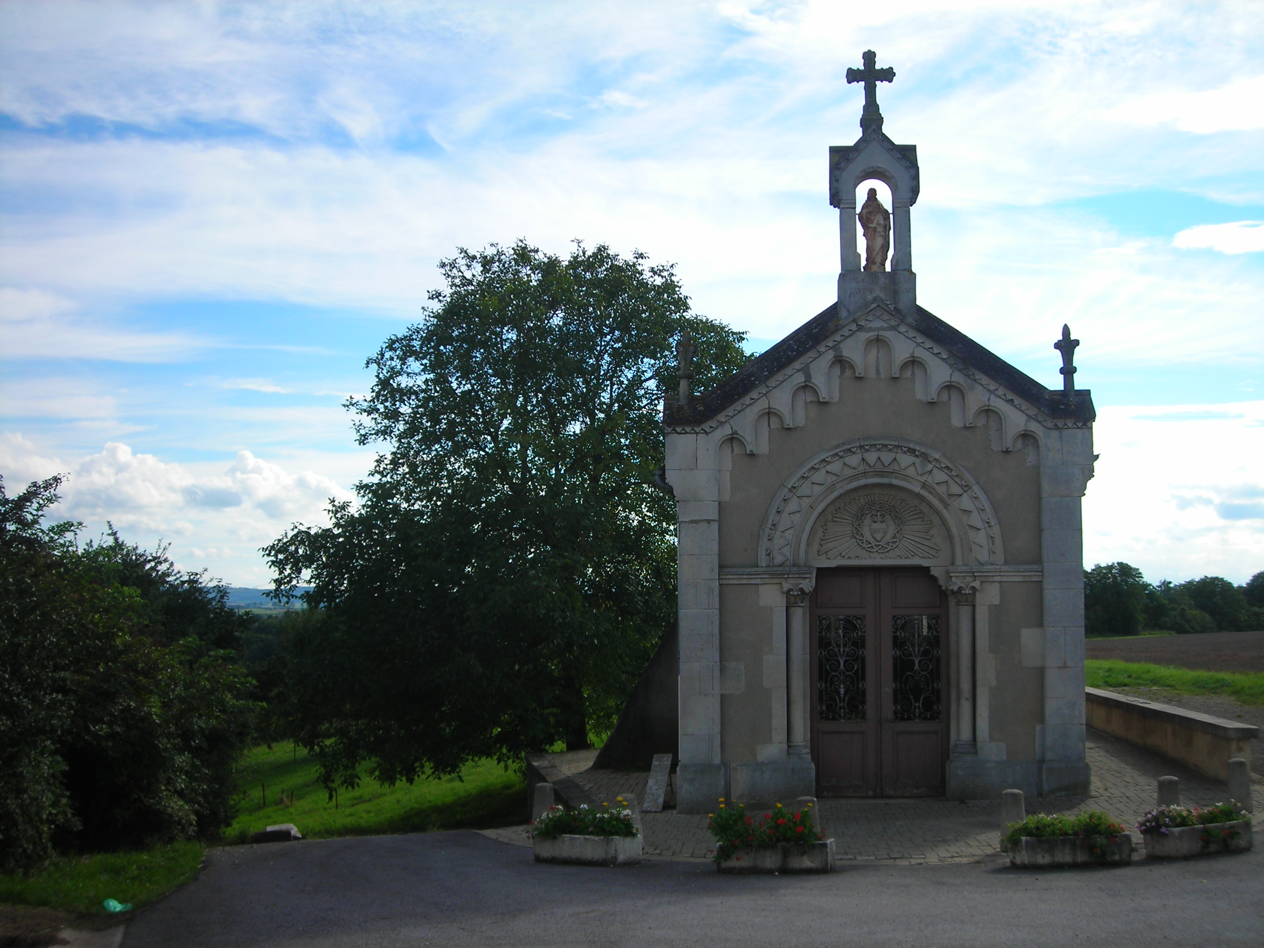 Chapelle d'Houdreville datant de la seconde moitié du XIX° siècle